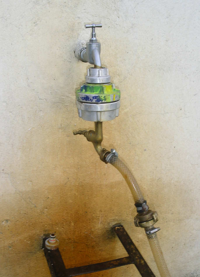 Schlauchkuppung und Reduzierstücke Storz und andere